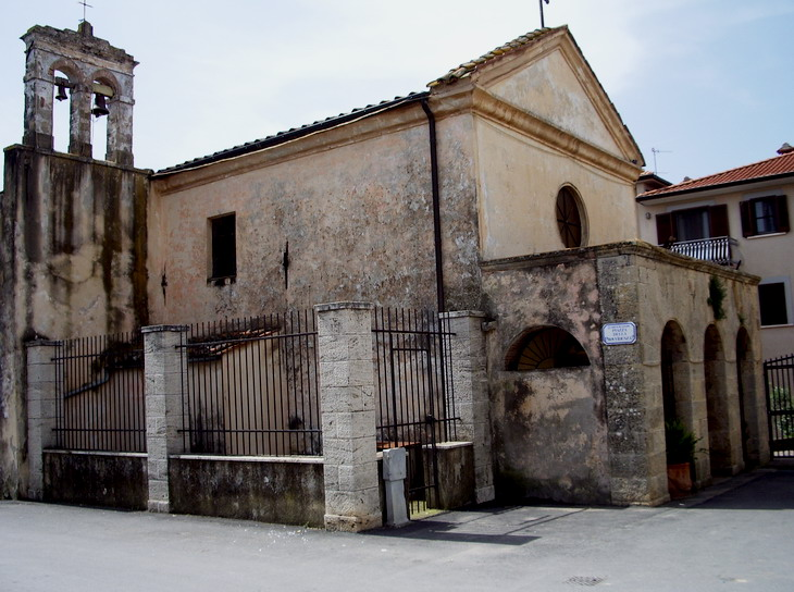 Oratorio della Provvidenza Capalbio